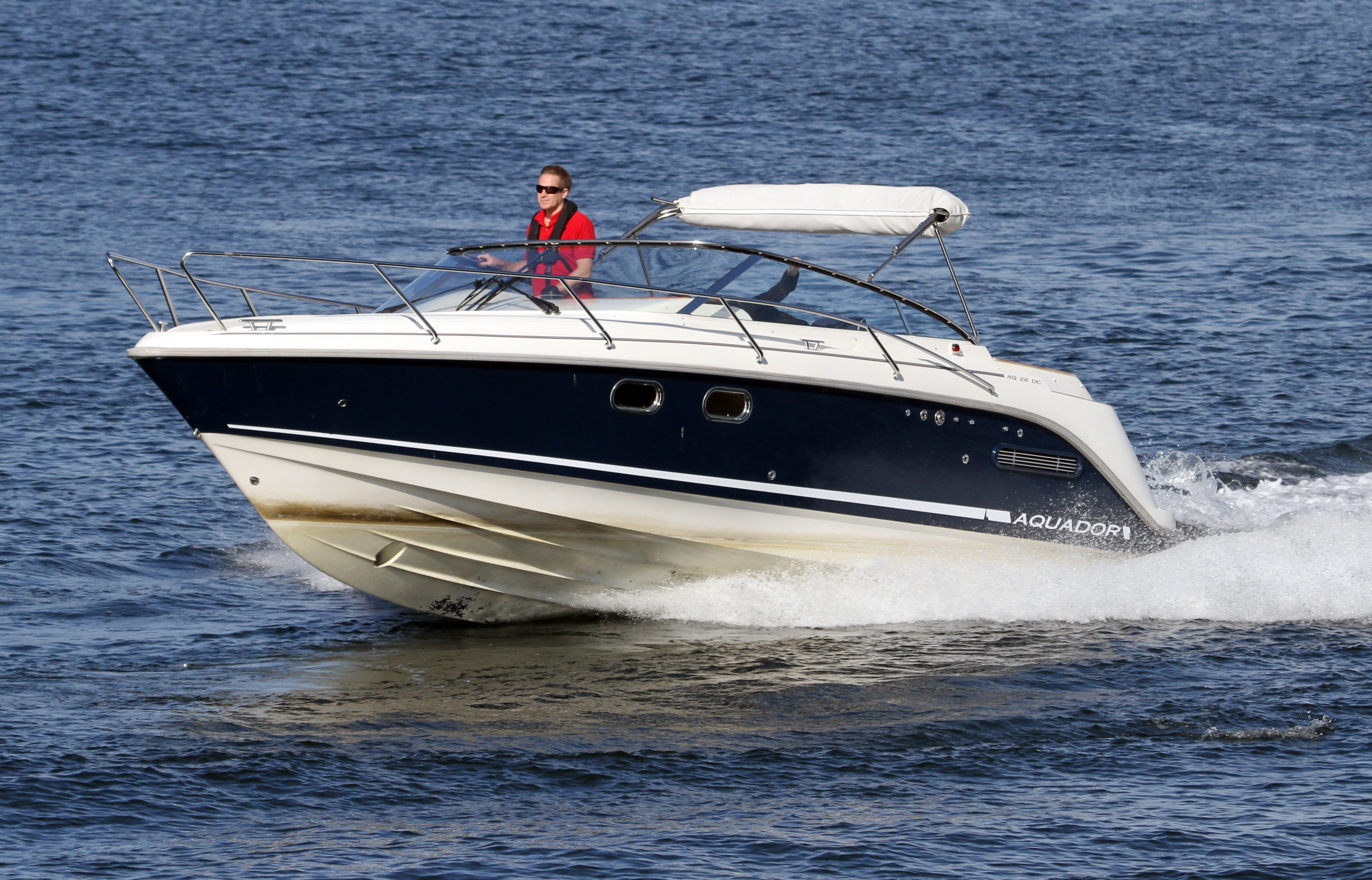 Aquador 26 DC i Lindalssundet, Vaxholm 4 augusti 2015